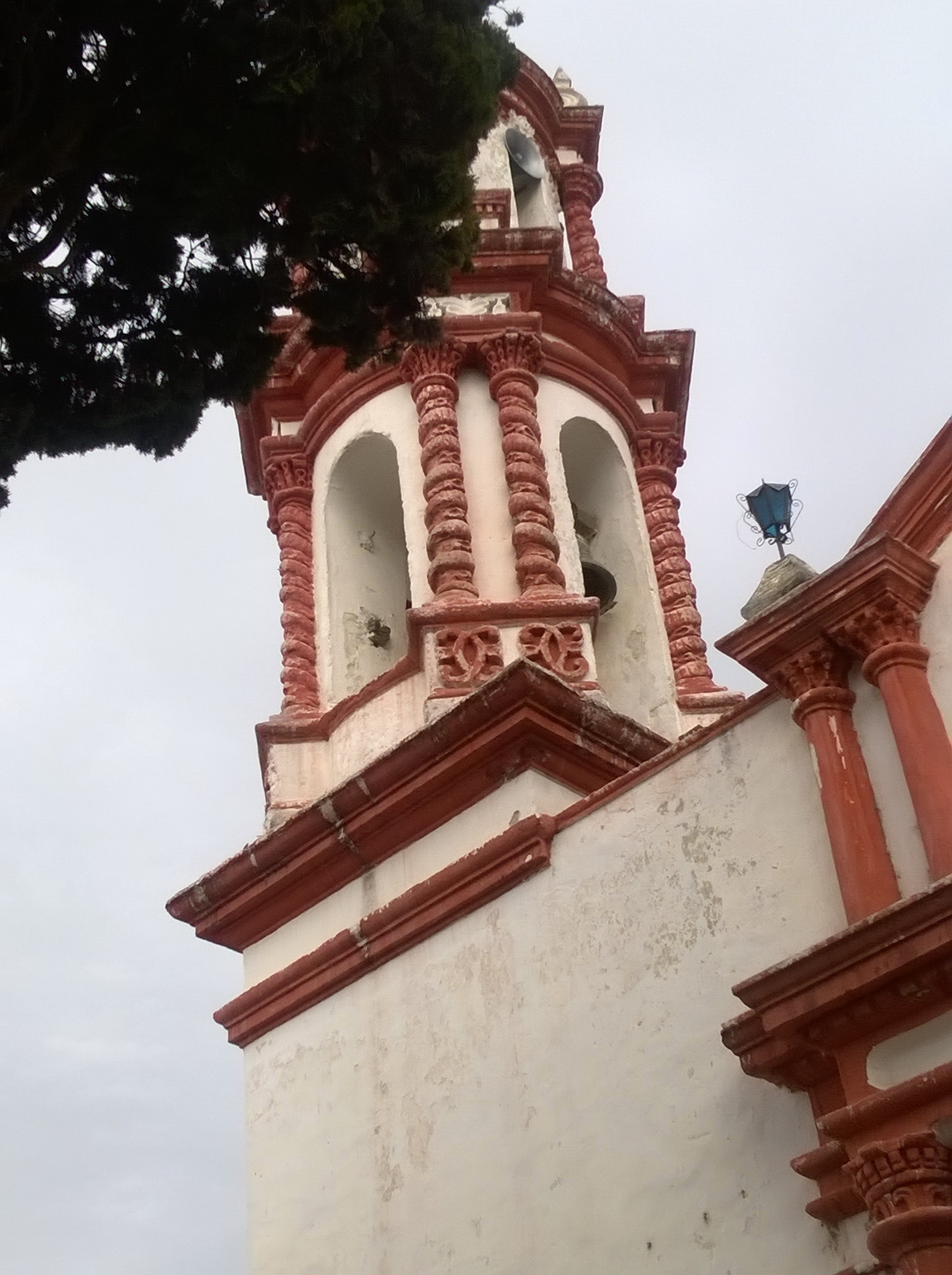 Iglesia de la Santa Cruz, Huamantla, Tlaxcala